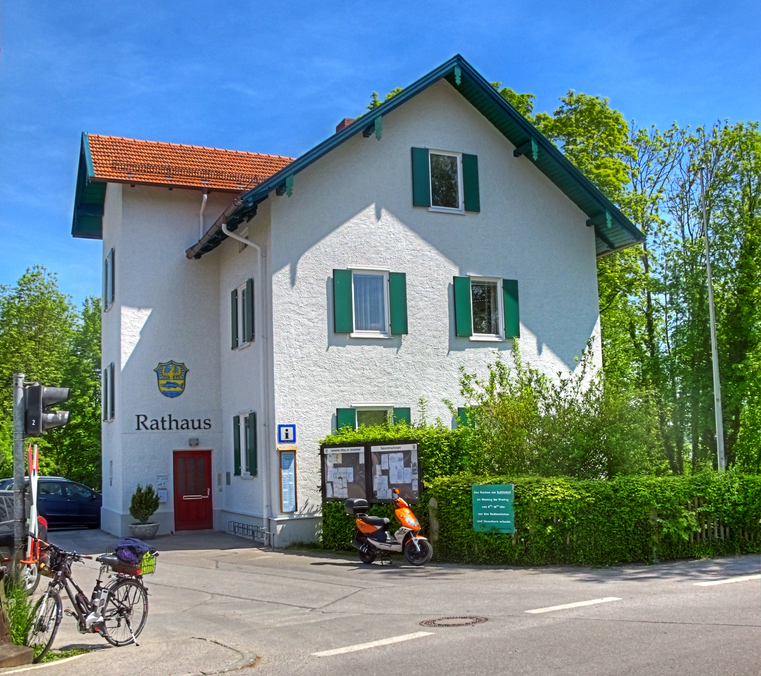 Deutschland, Bayern, Landkreis Landsberg am Lech, Utting, Rathaus am Bahnhof (HDR-Image)